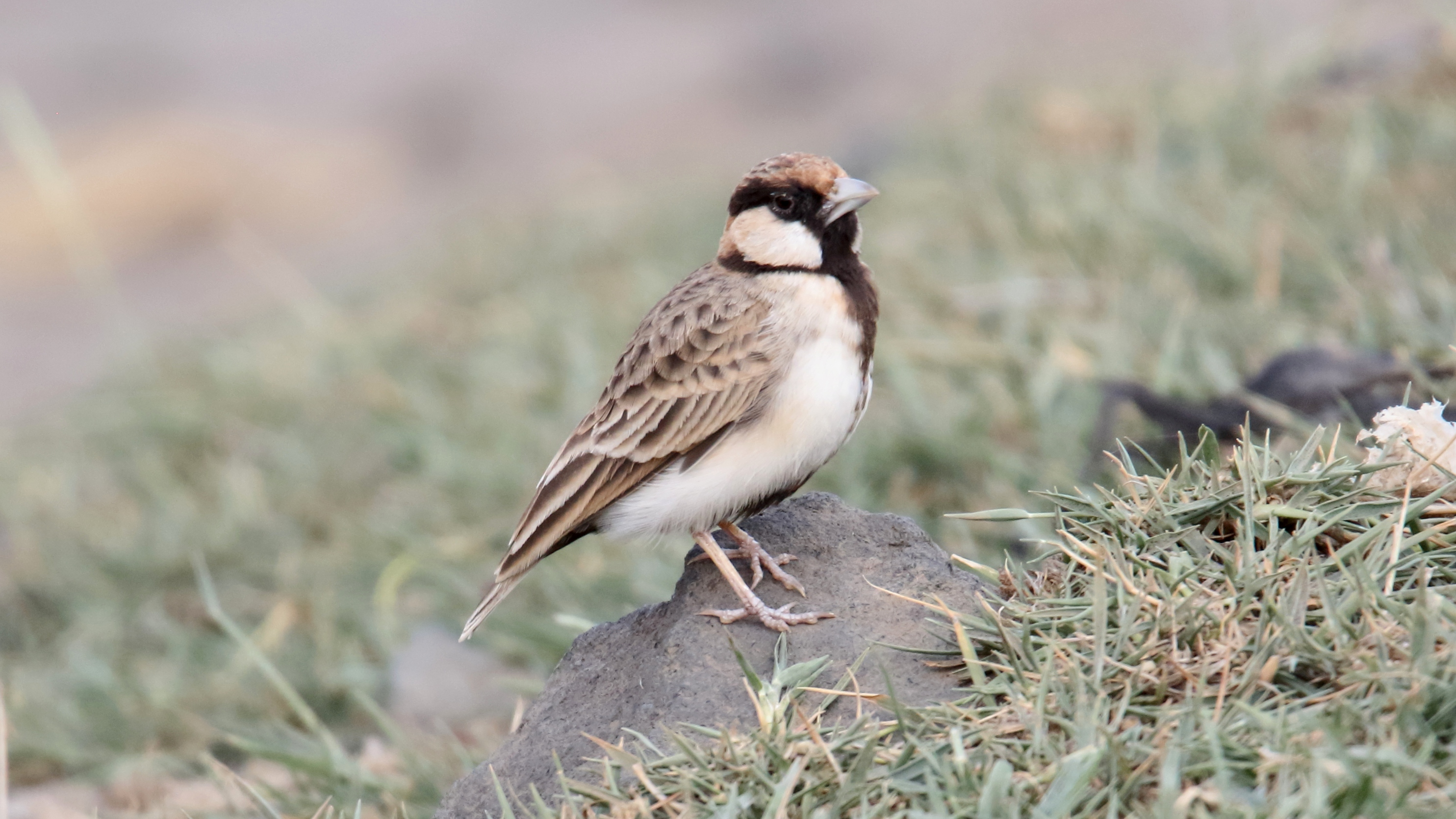 Fischer's Sparrow-Lark (Eremopterix leucopareia)